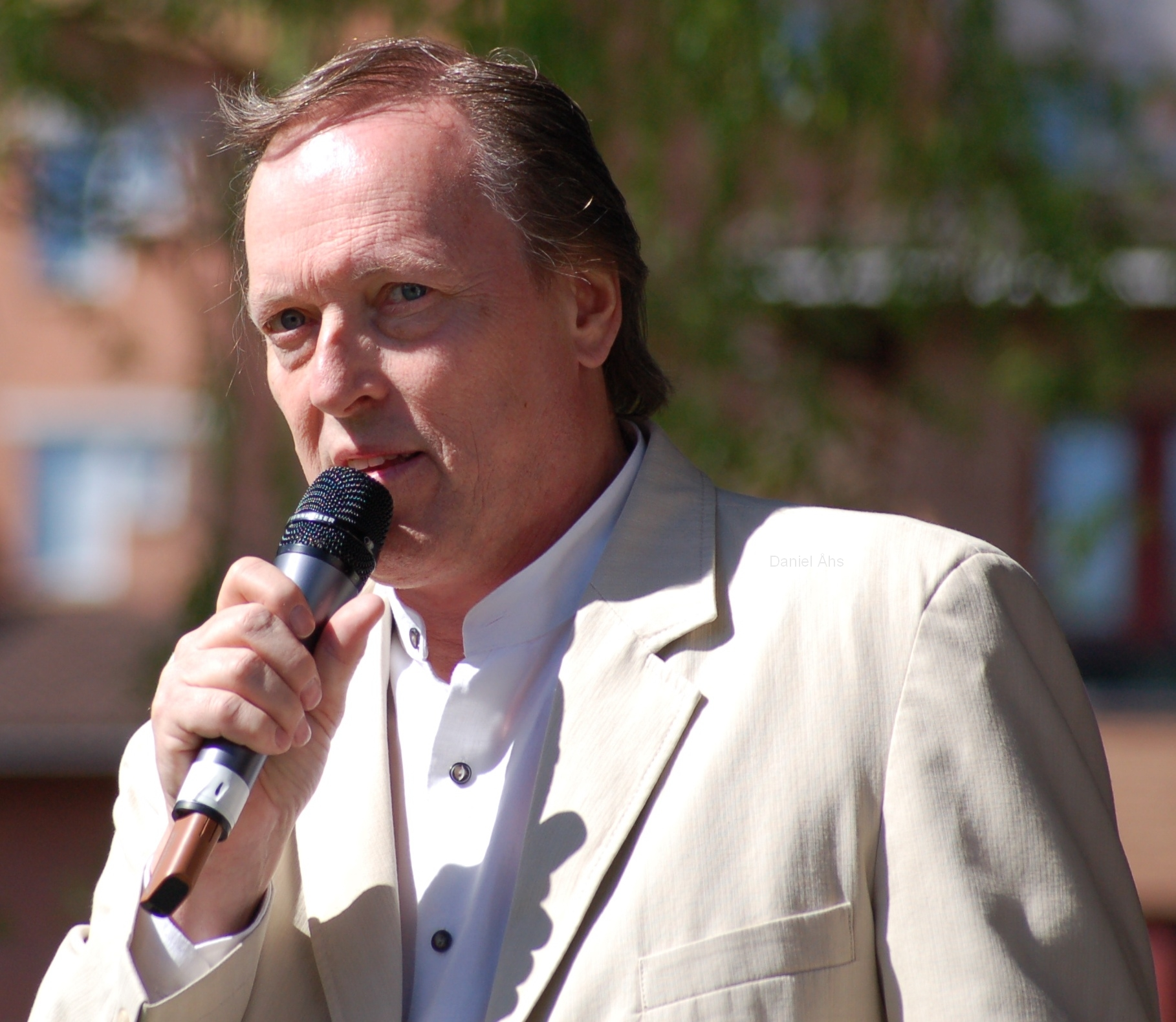 Ragnar Dahlberg i 2007 Norrköping.